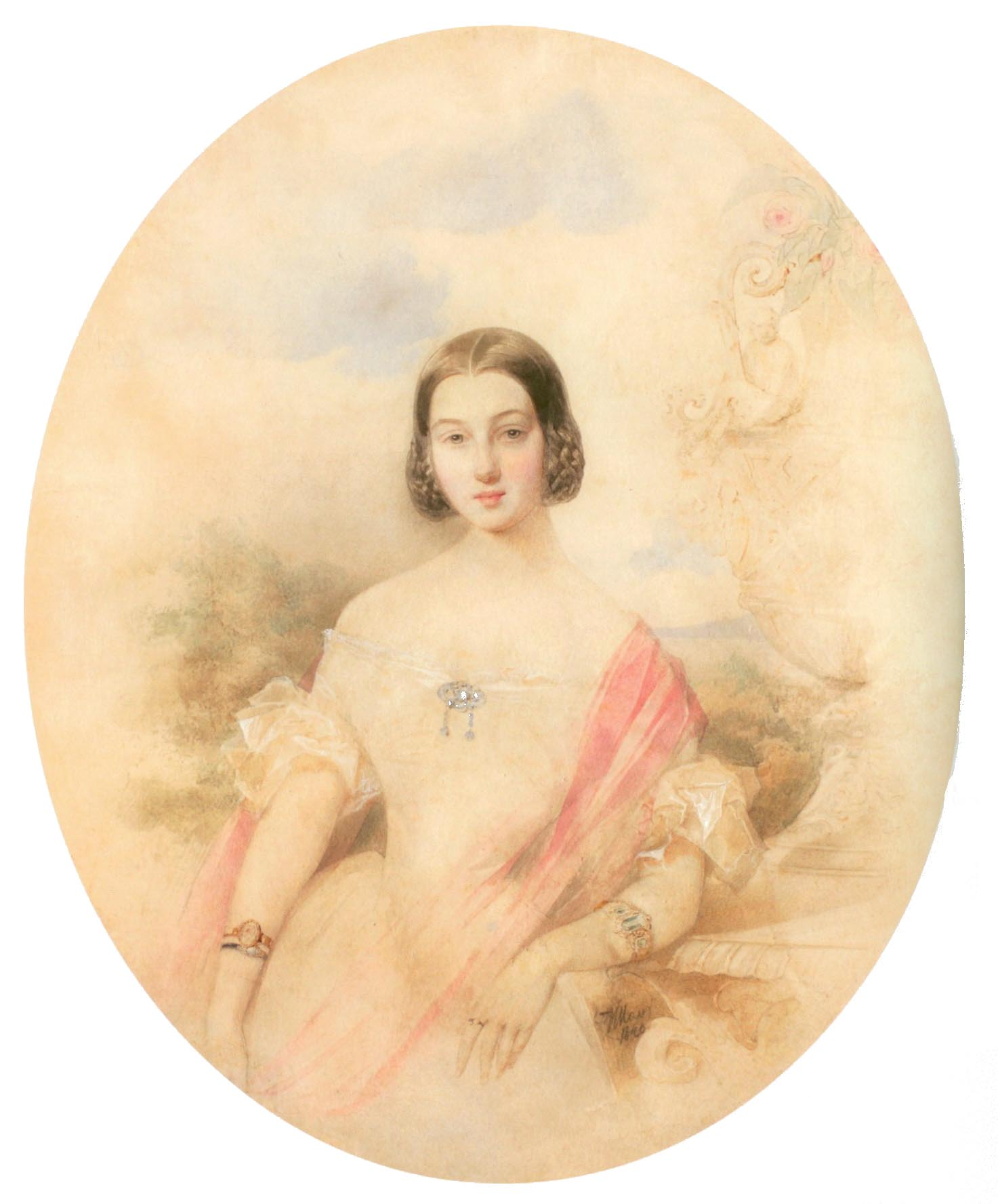 Вера Ивановна Опочинина, ур.Скобелева (1825- после 1892), фрейлина, дочь генерала И.Н.Скобелева, с 1840 года жена К.Ф. Опочинина (1808-1848).